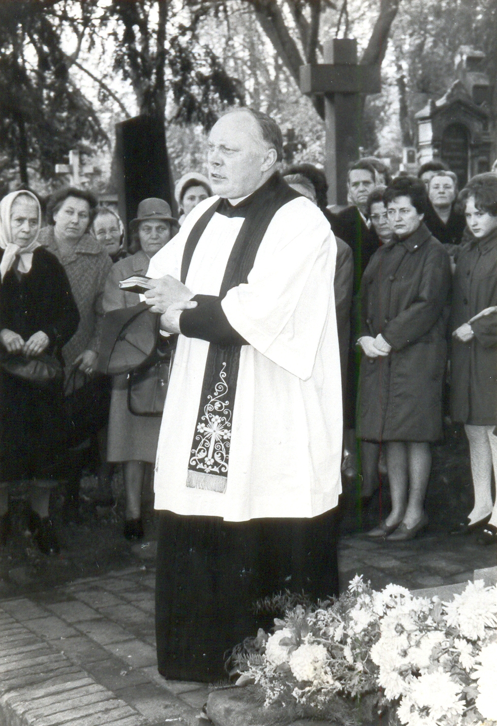 P. Josef Helikar (Litoměřice, 2. pol. 60. let 20. století)